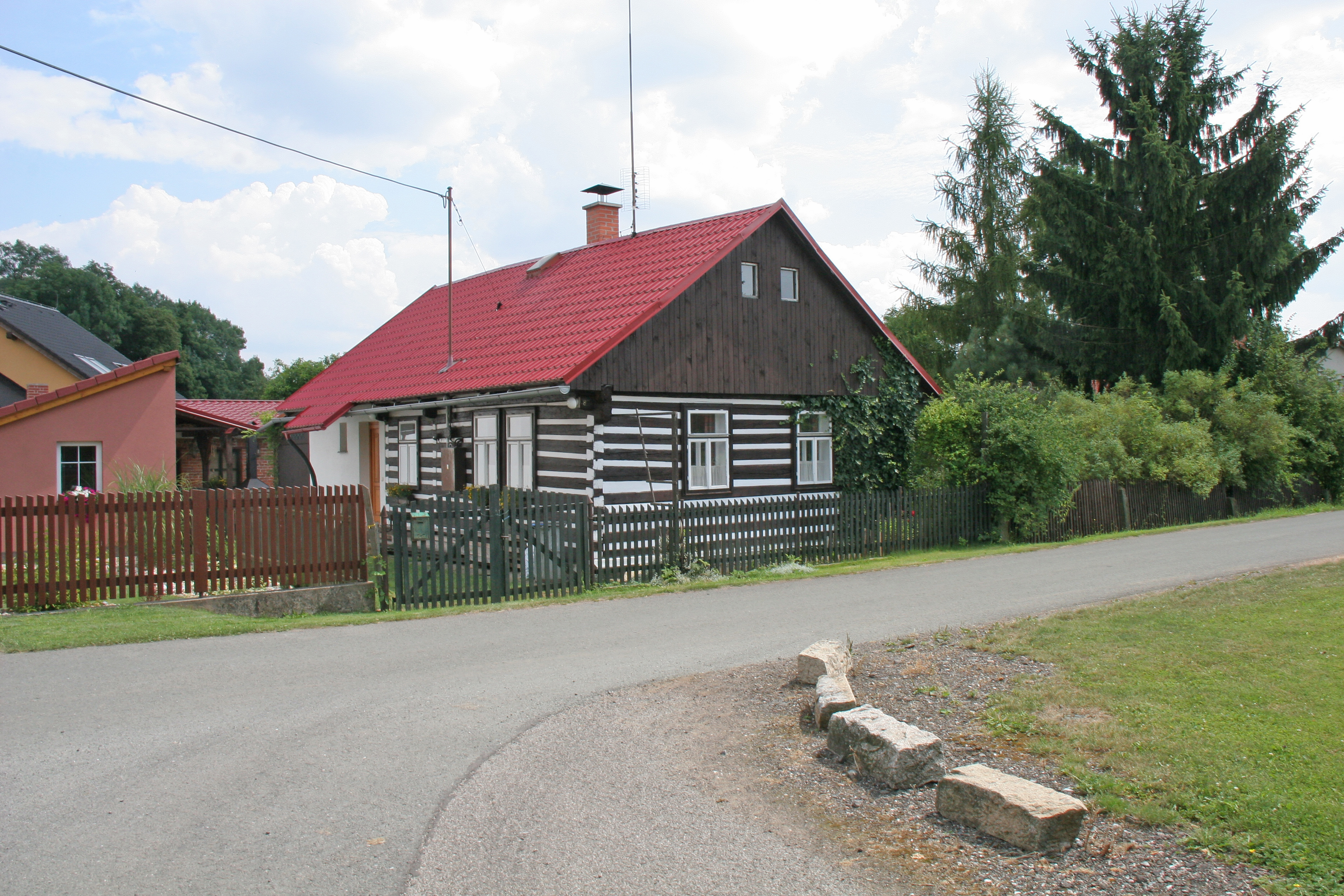 Rohoznice čp. 80